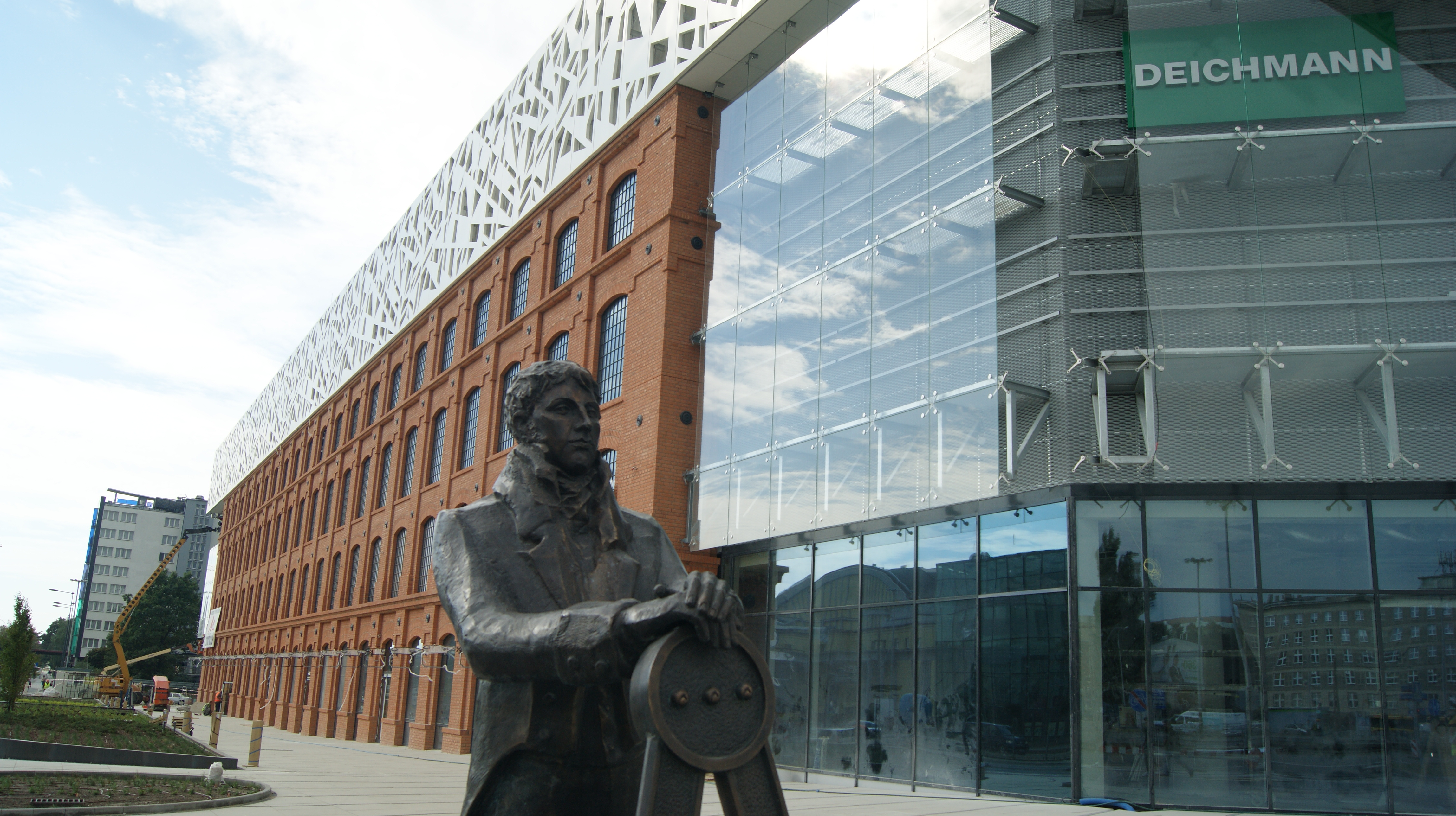 Bardzo efektownie prezentuje się Sukcesja - Centrum Handlu i Rozrywki w Łodzi. Nie wiele już zostało do zrobienia. Obiekt jest juz prawie gotowy i wkrótce będzie huczne otwarcie!